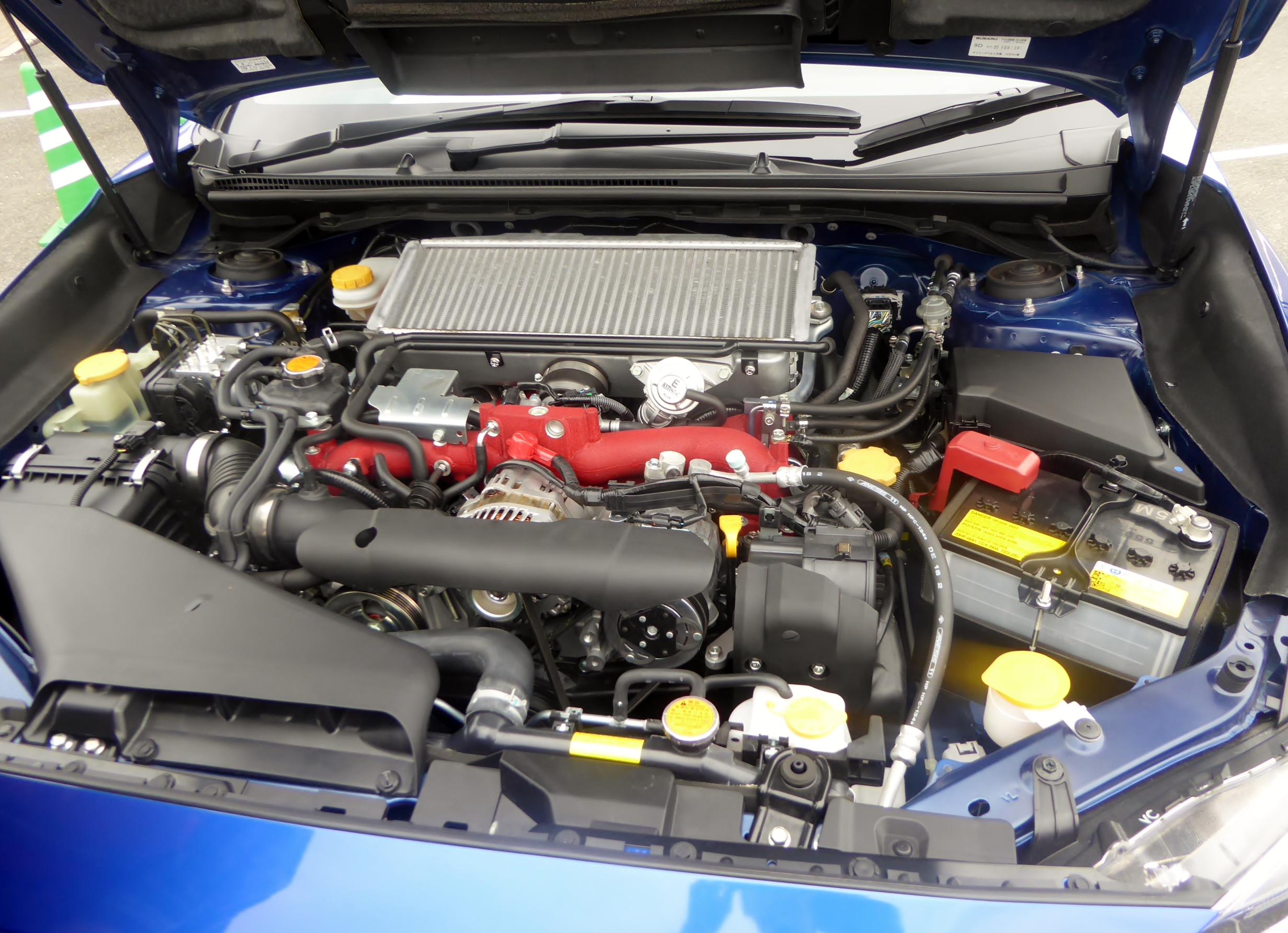 スバル・EJ20エンジンを撮影。